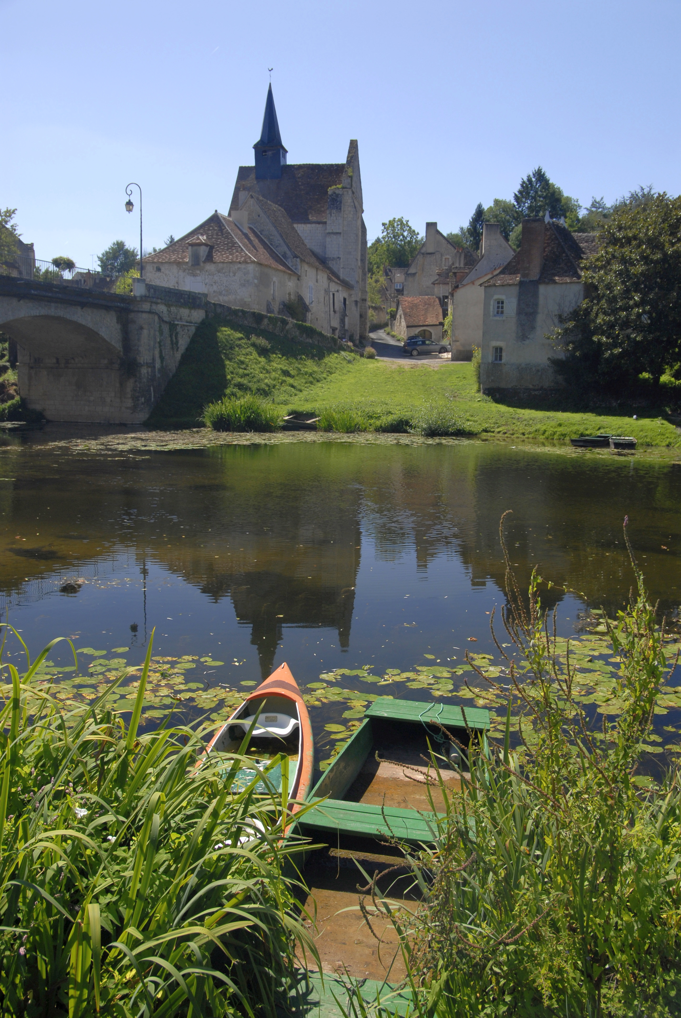 Angles-sur-l'Anglin, Saint-Croix mit ehem. Abteikirche